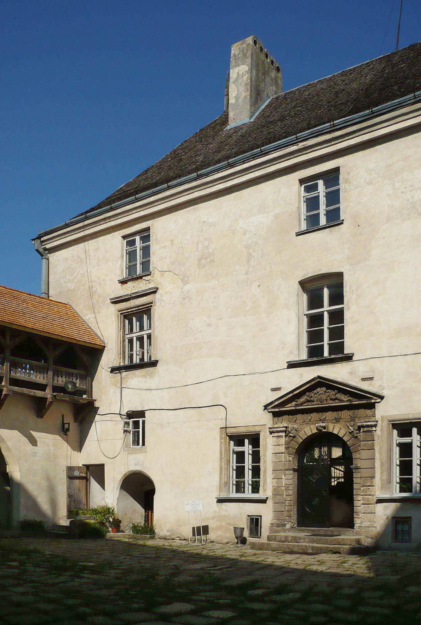 Dziedziniec zamku w Olesku